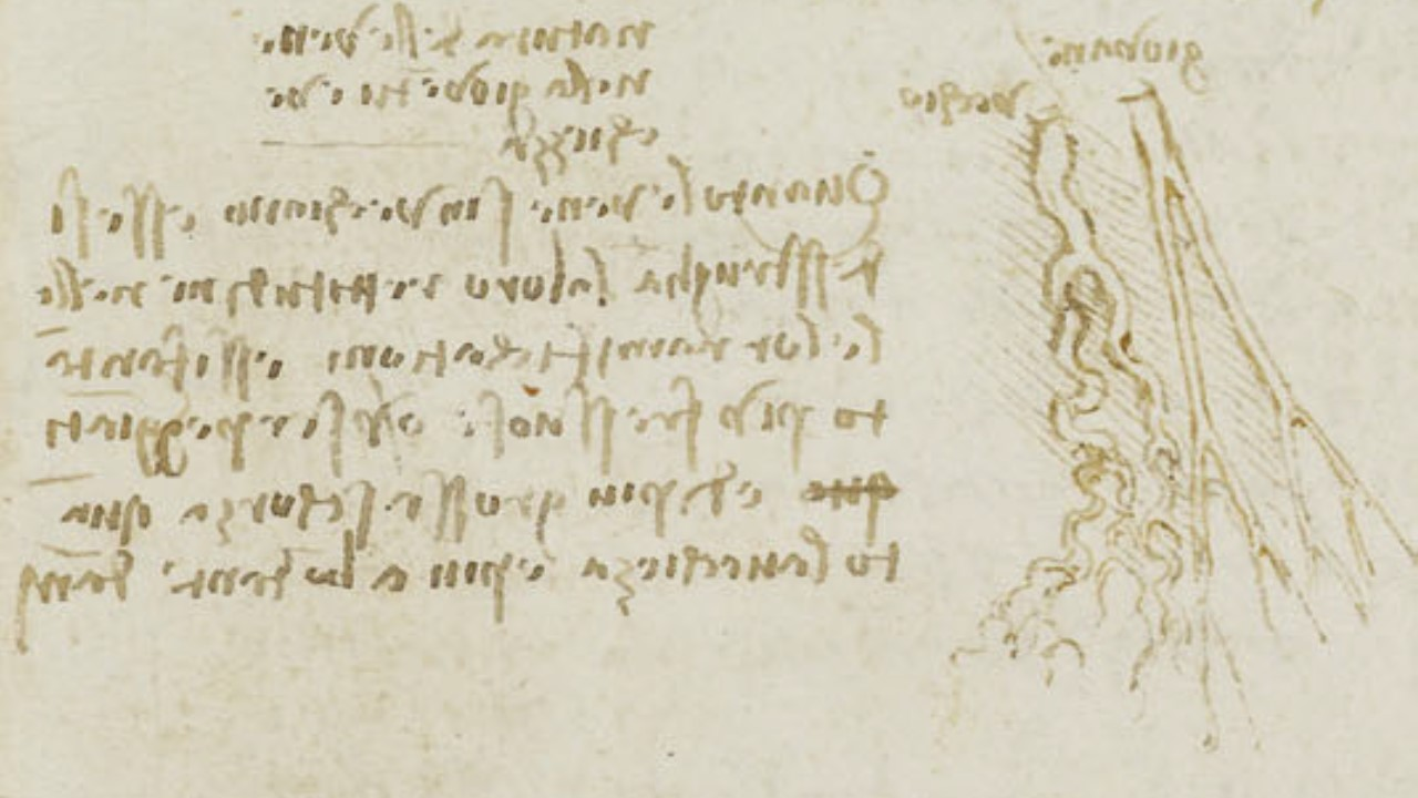 Disegno di Leonardo da Vinci. Tratto da Dell'Anatomia, Foglio 10B verso.